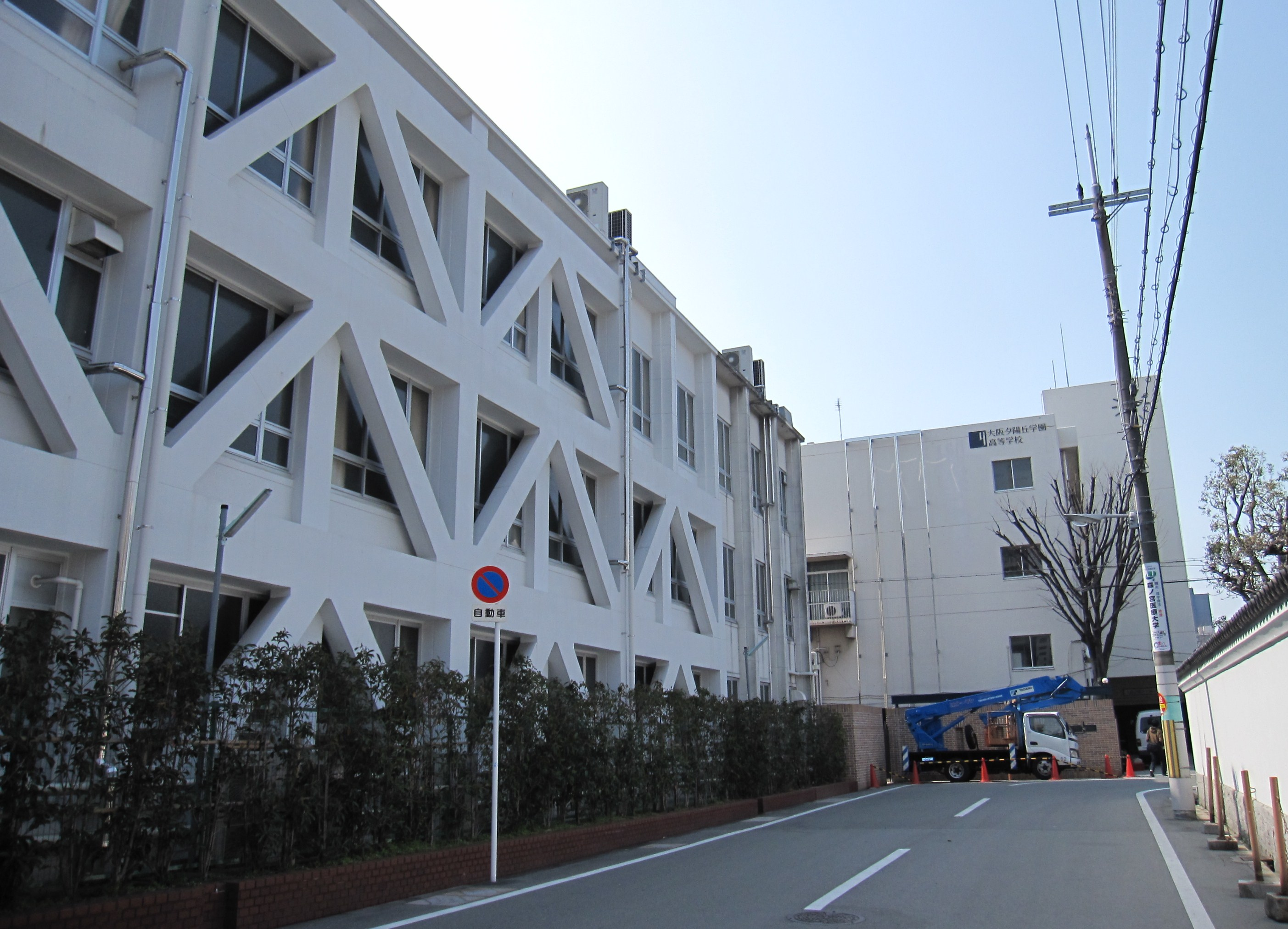 大阪夕陽丘学園高等学校